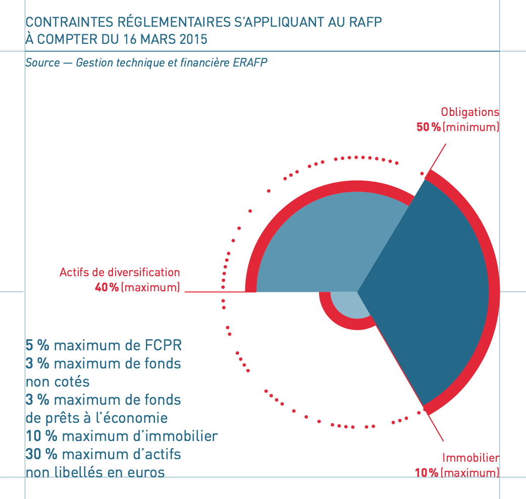 Contraintes réglementaires s'appliquant au RAFP Source - Gestion technique et financière ERAFP